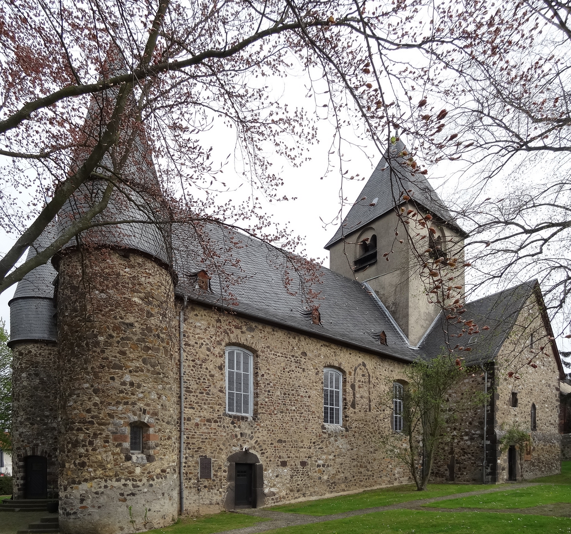 St. Peter (Großen-Linden)